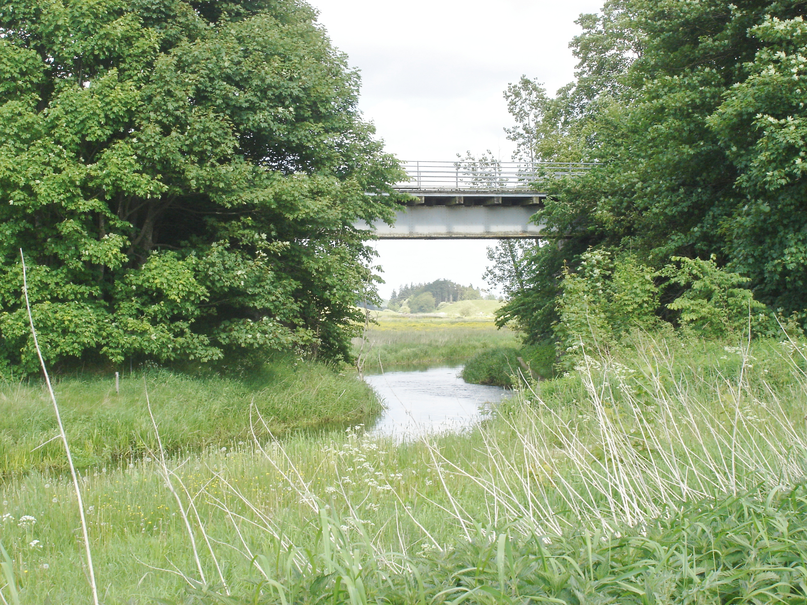 Himmerlandsstien krydser Simested Å SØ for Aalestrup